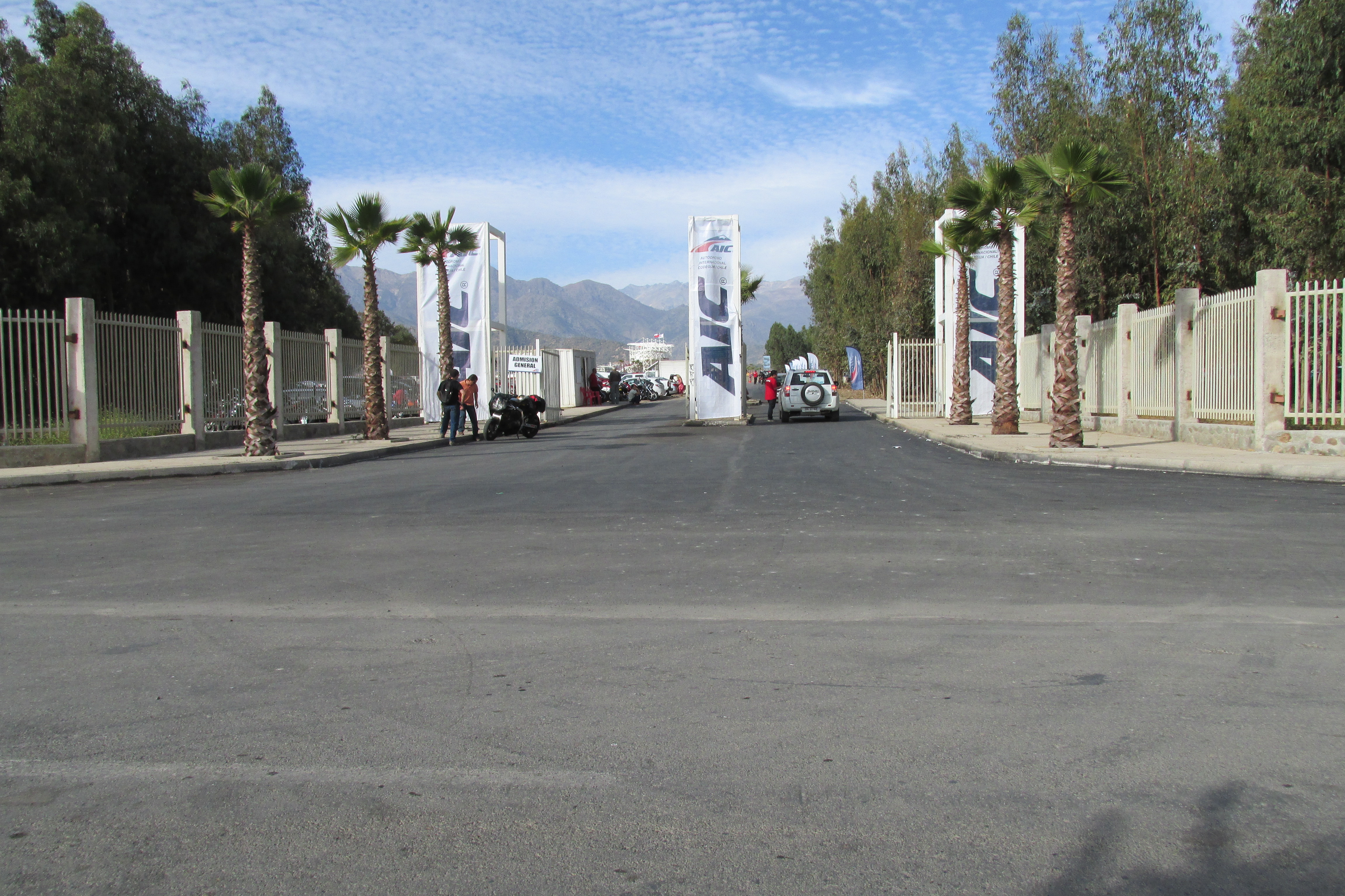 Acceso principal al Autódromo Internacional Codegua, en comuna de Codegua, región de O"higgins